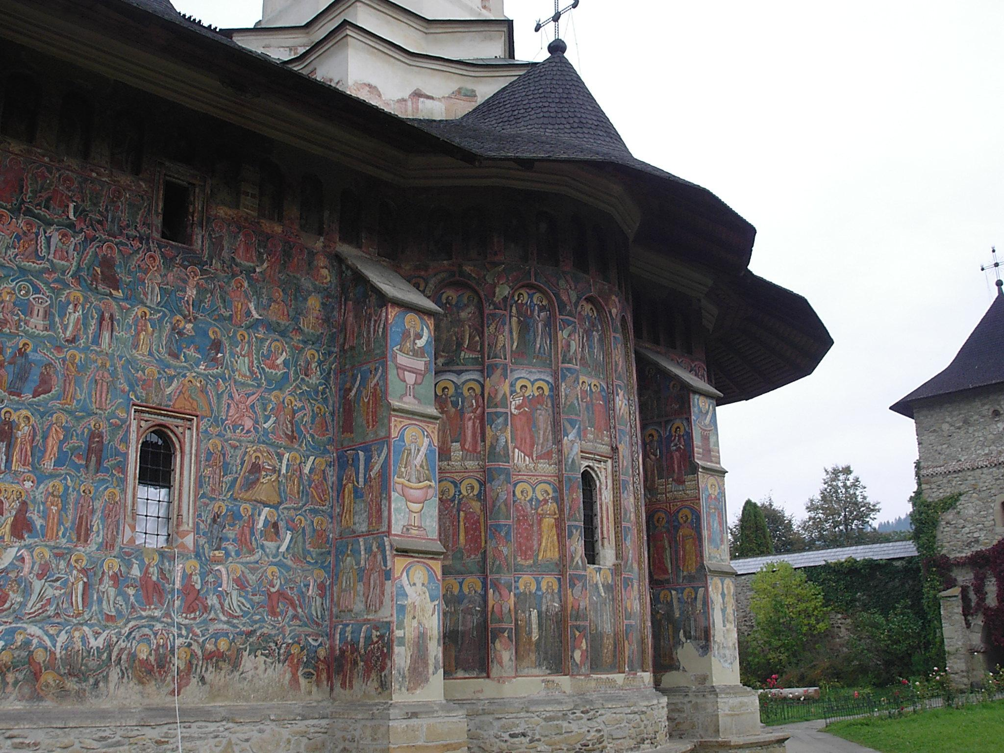 Moldoviţa:Kolostortemplom délkeleti homlozat (KSI 2003)